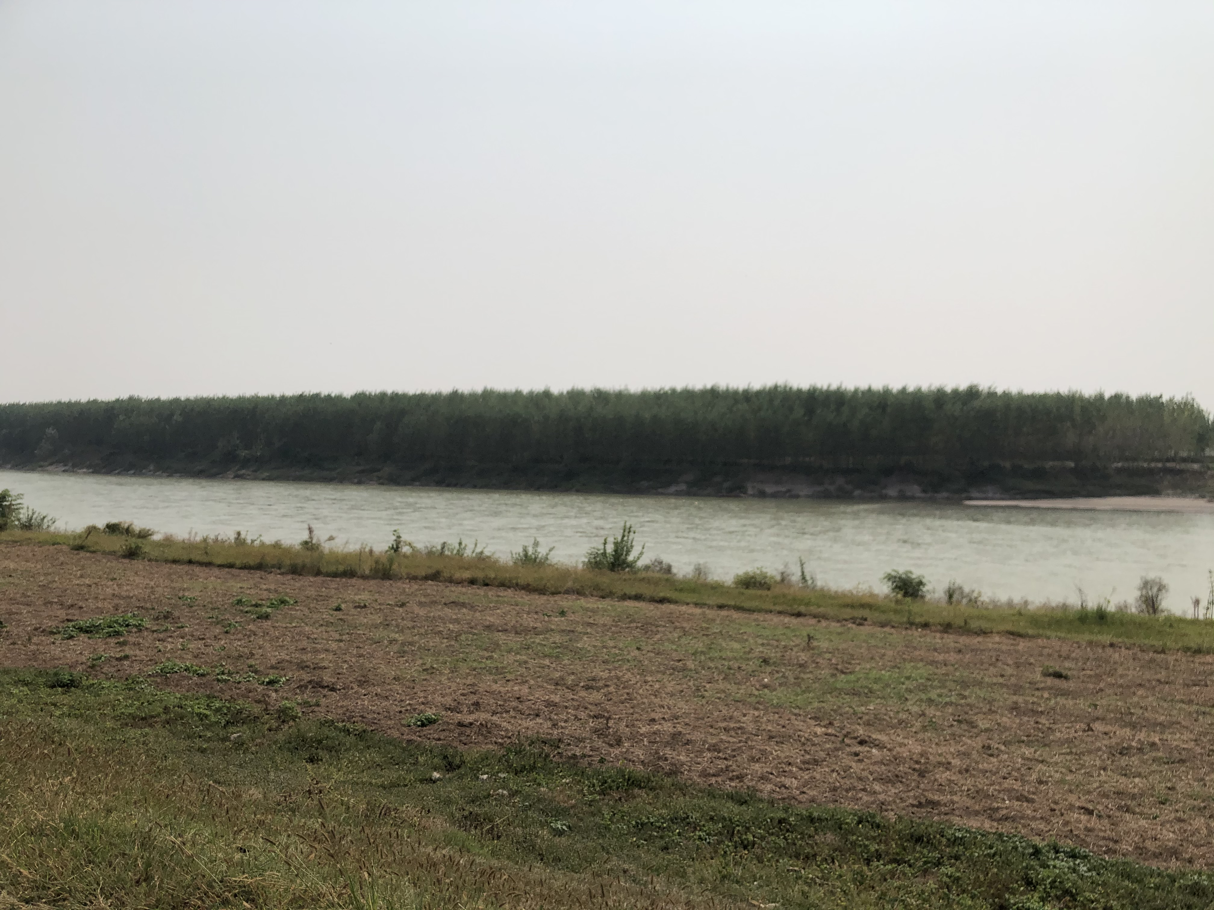 中文（中国大陆）: 松滋河（别名马峪河）的东支，俗称松东河。